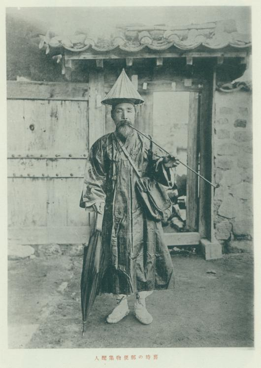 옛날 우편물 집배원의 모습을 담은 자료사진 , 원 자료출처 『寫眞帖 朝鮮』(朝鮮總督府, 1921)